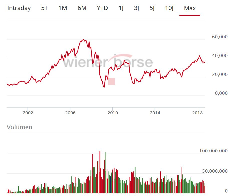 Chart der ERSTE GROUP BANK an der Wiener Börse (2000-2018).